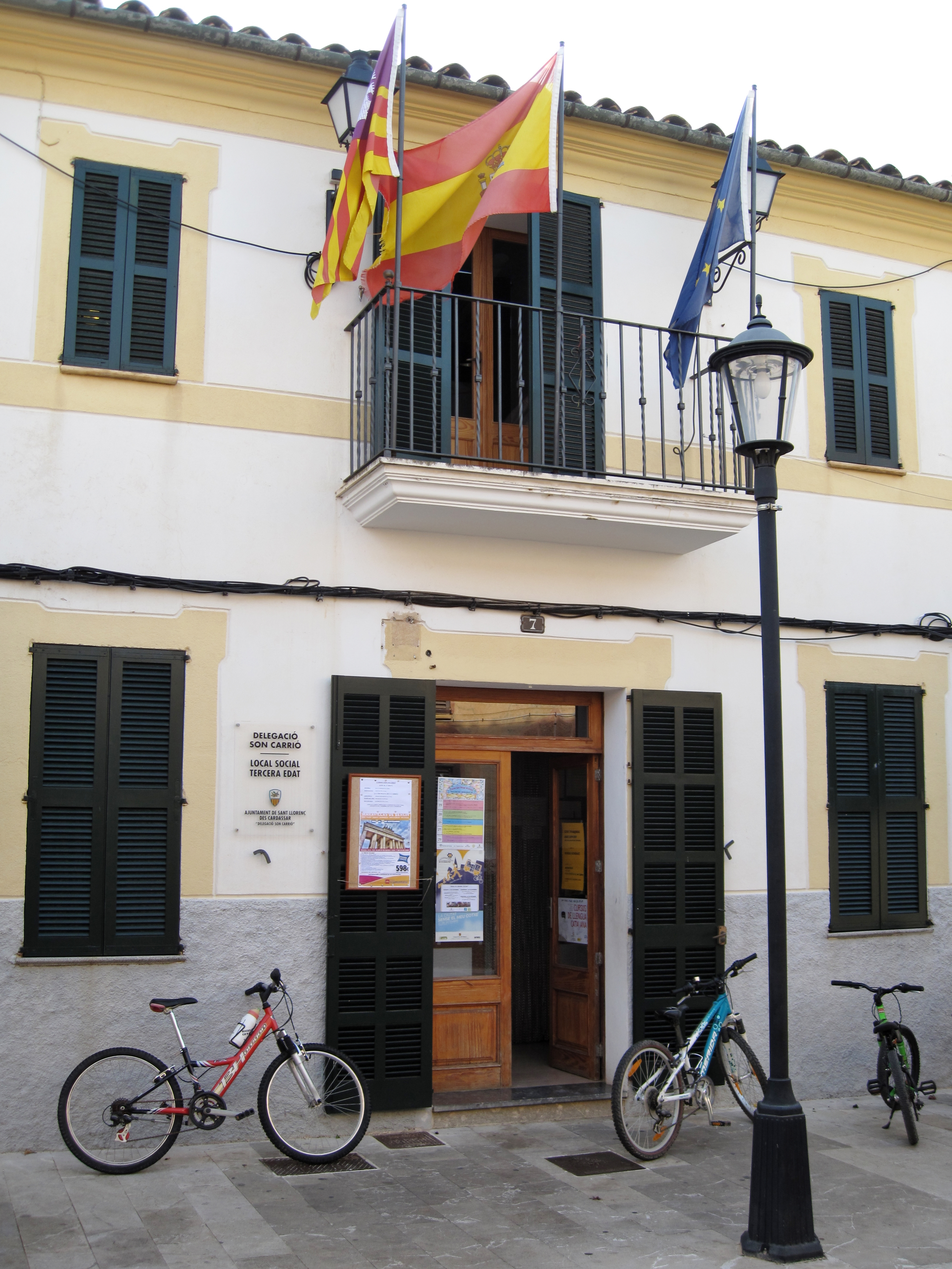 Delegació Son Carrió in Son Carrió, Mallorca, Spanien